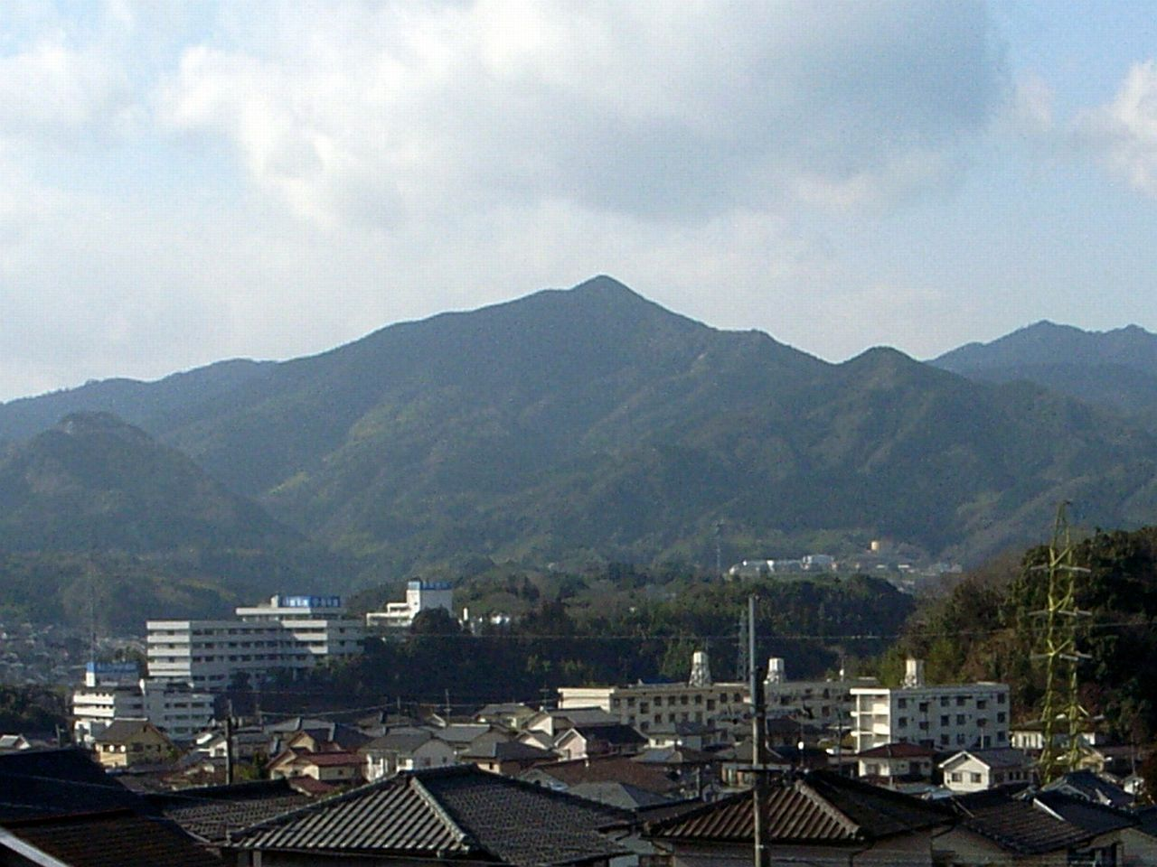 Mt. Hongu-san (本宮山), Oita City, Oita Pref., Japan